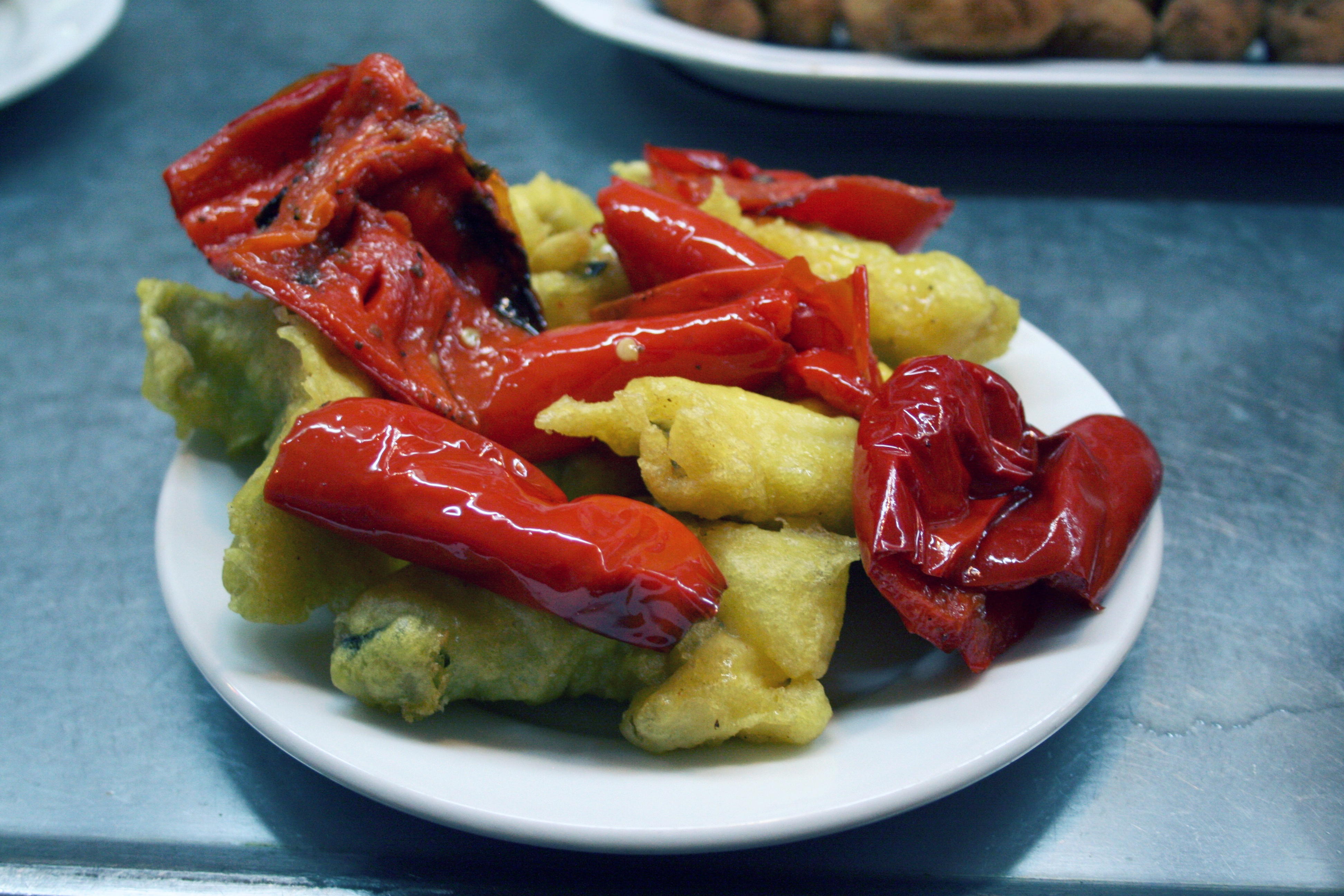 Soldaditos de Pavia